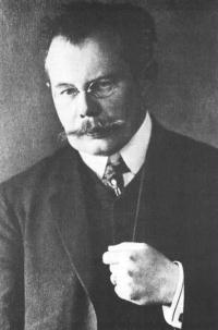 Richard Wetz (Komponist, 1875-1935)